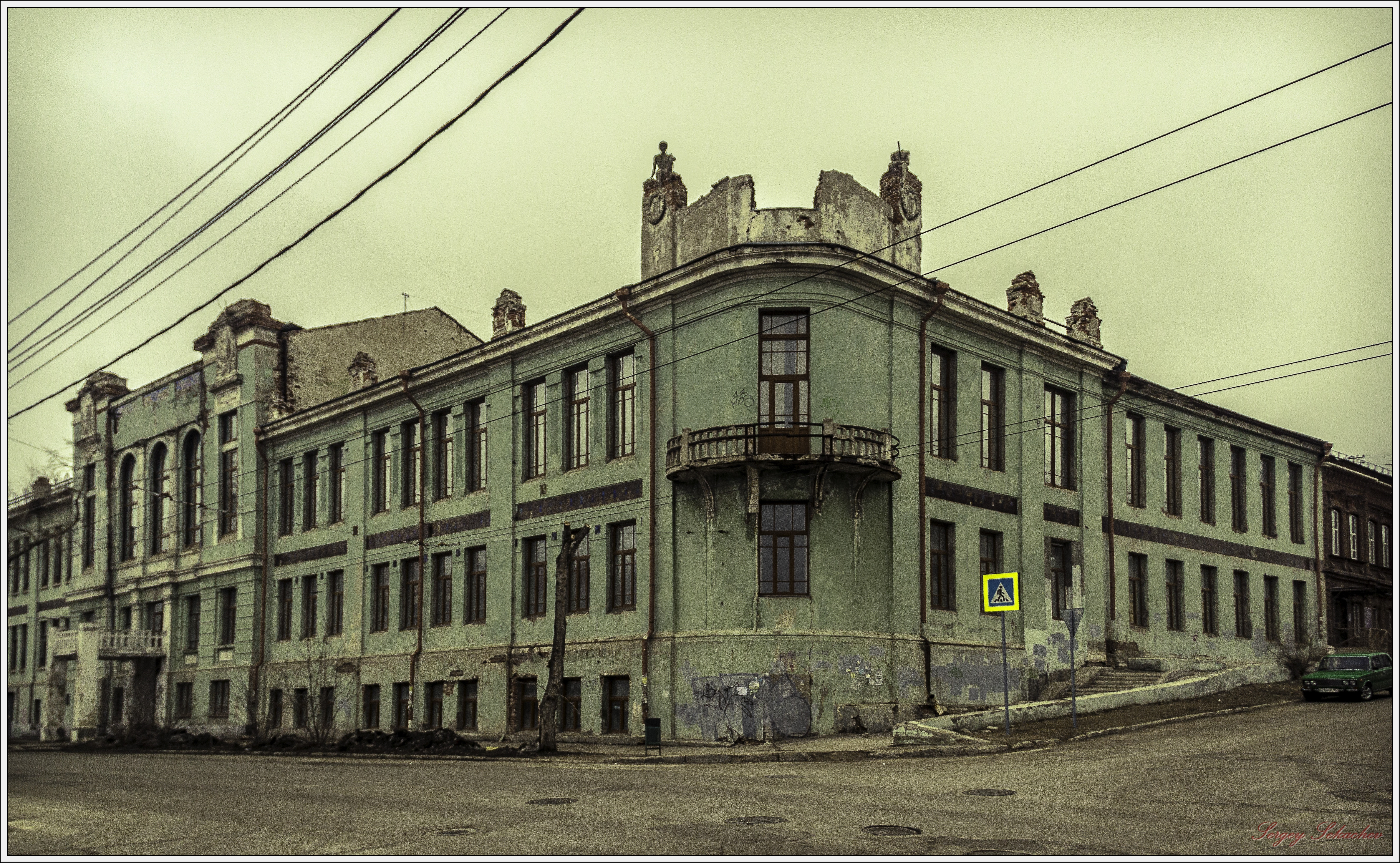 Самарское реальное училище: улица Комсомольская, 18, Алексея Толстого улица, 31-33, Самара, Самарская область